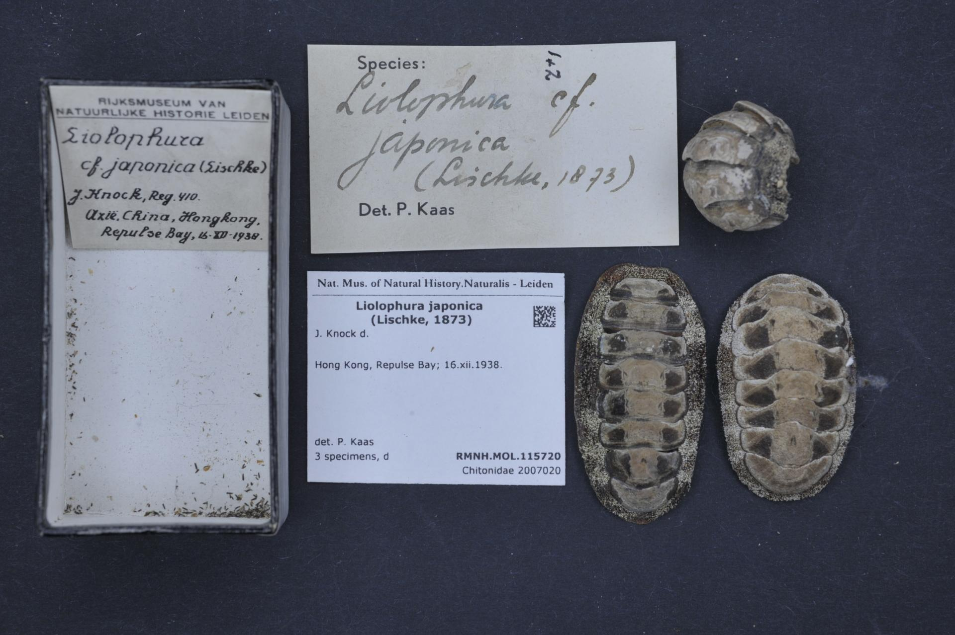 Liolophura japonica (Lischke, 1873)